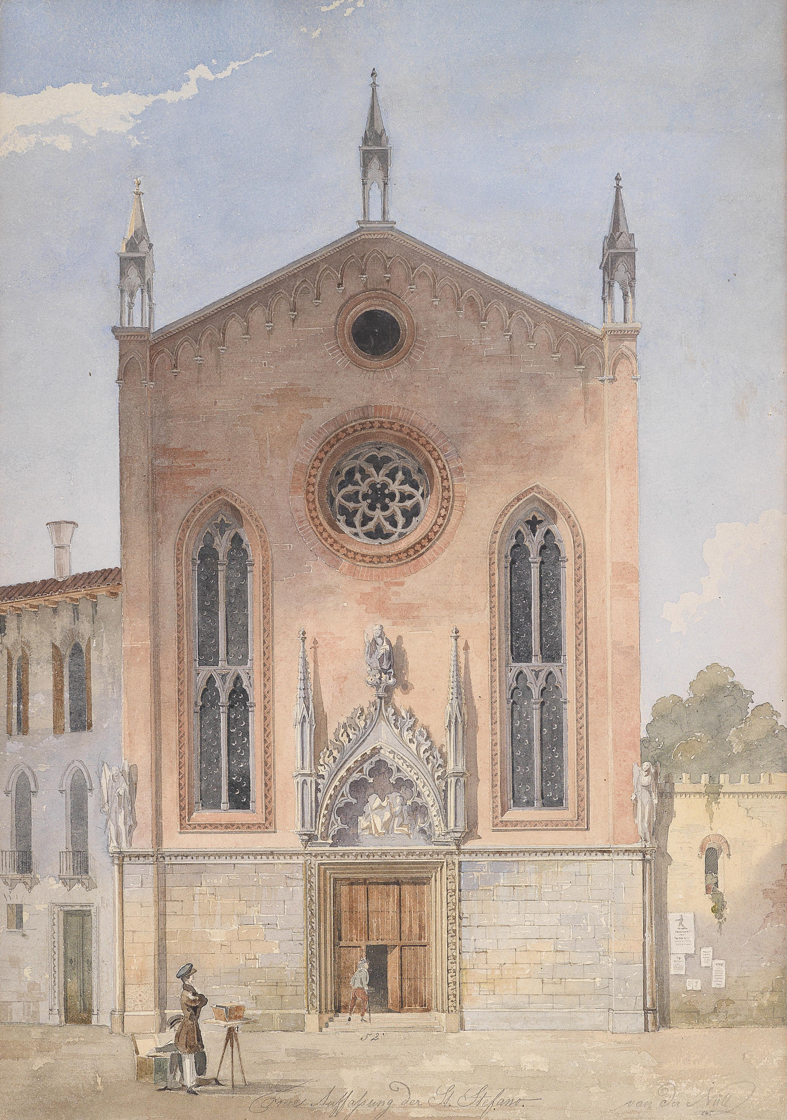 Die Chiesa di Santo Stefano in Venedig, mit handschriftlichem Kommentar versehen "freie Auffassung der St. Stefano", signiert und datiert "van der Nüll 845", Aquarell auf Papier, 34 x 24 cm